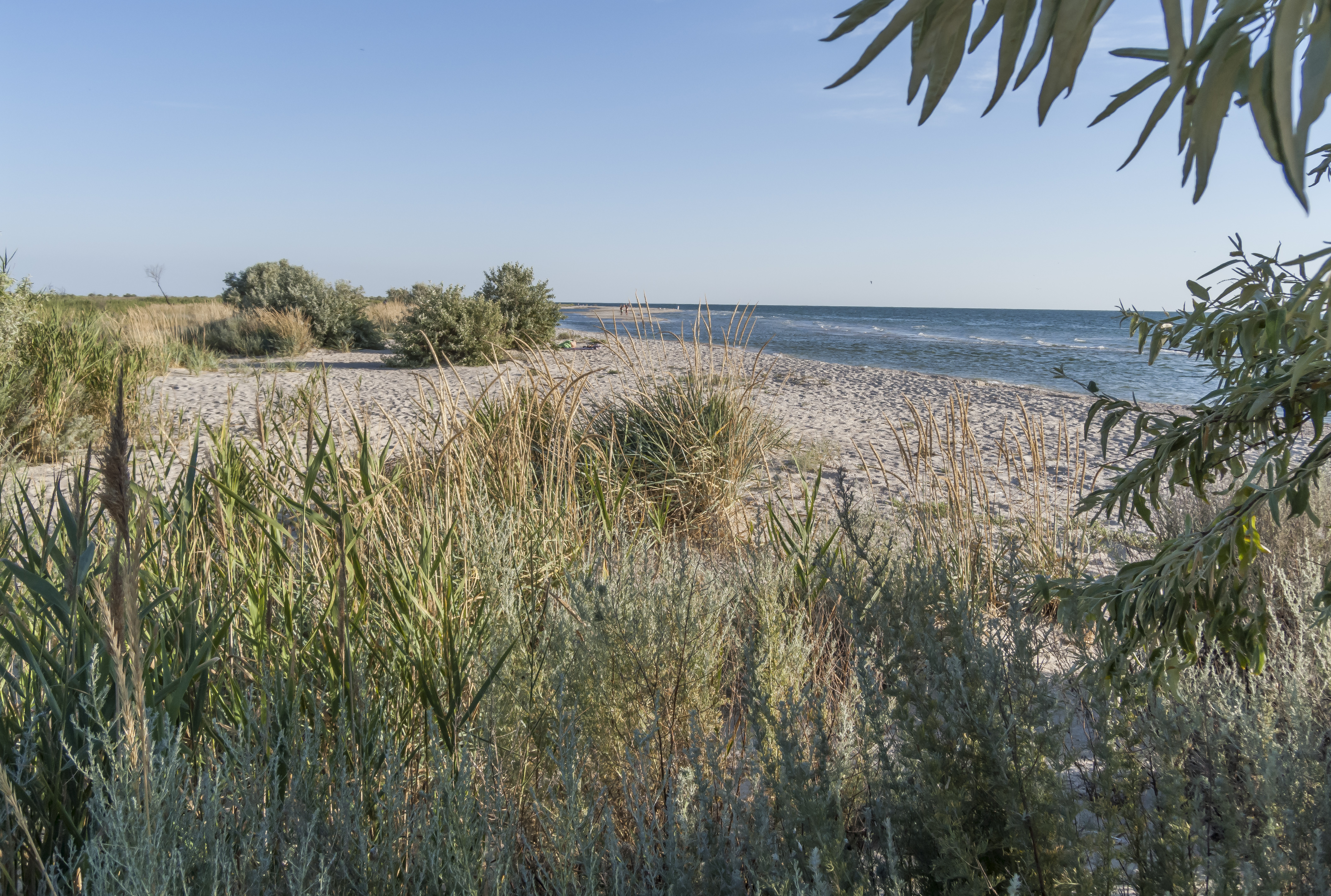 Бердянская коса - июль, 2017